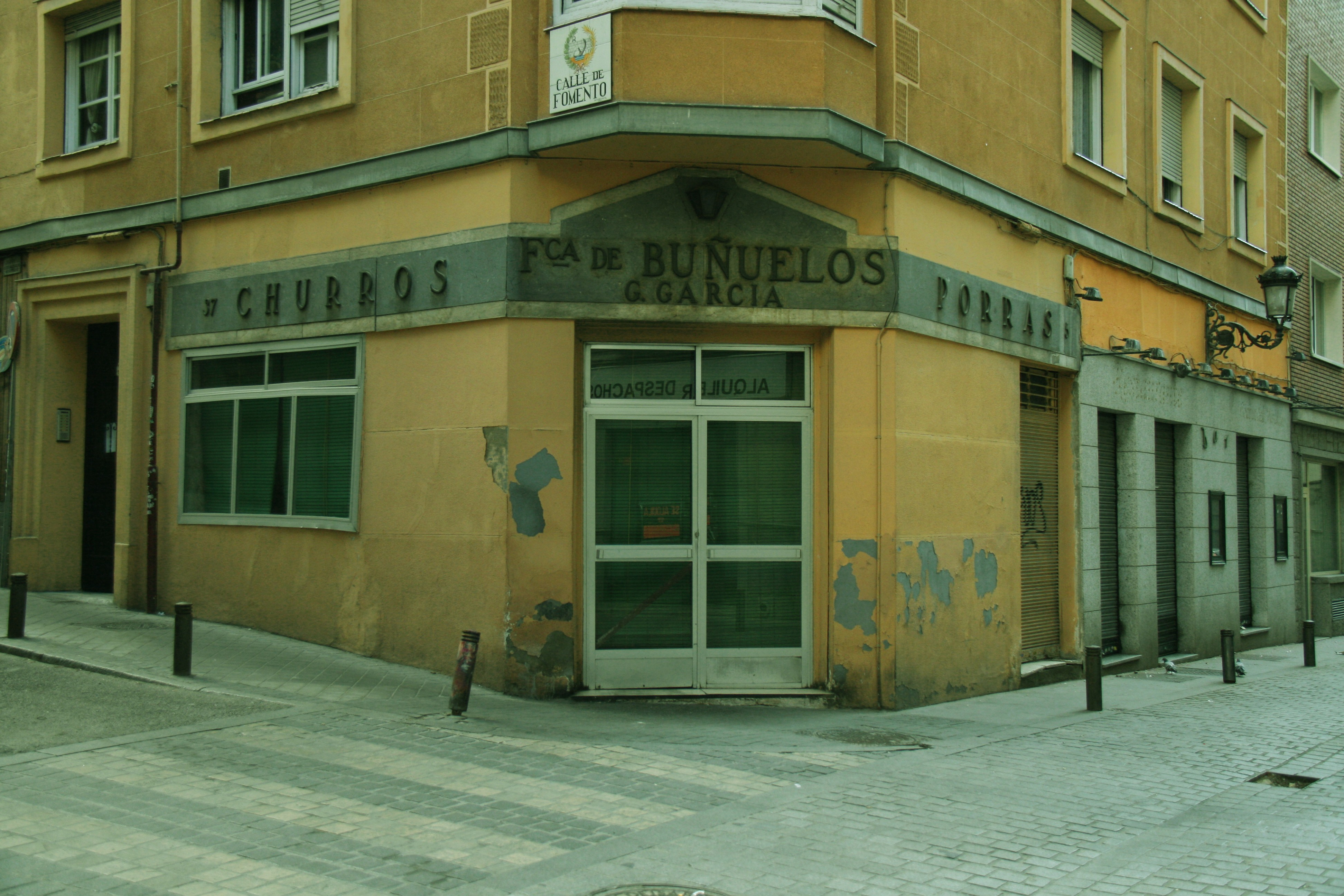 Churrrería MAdrid